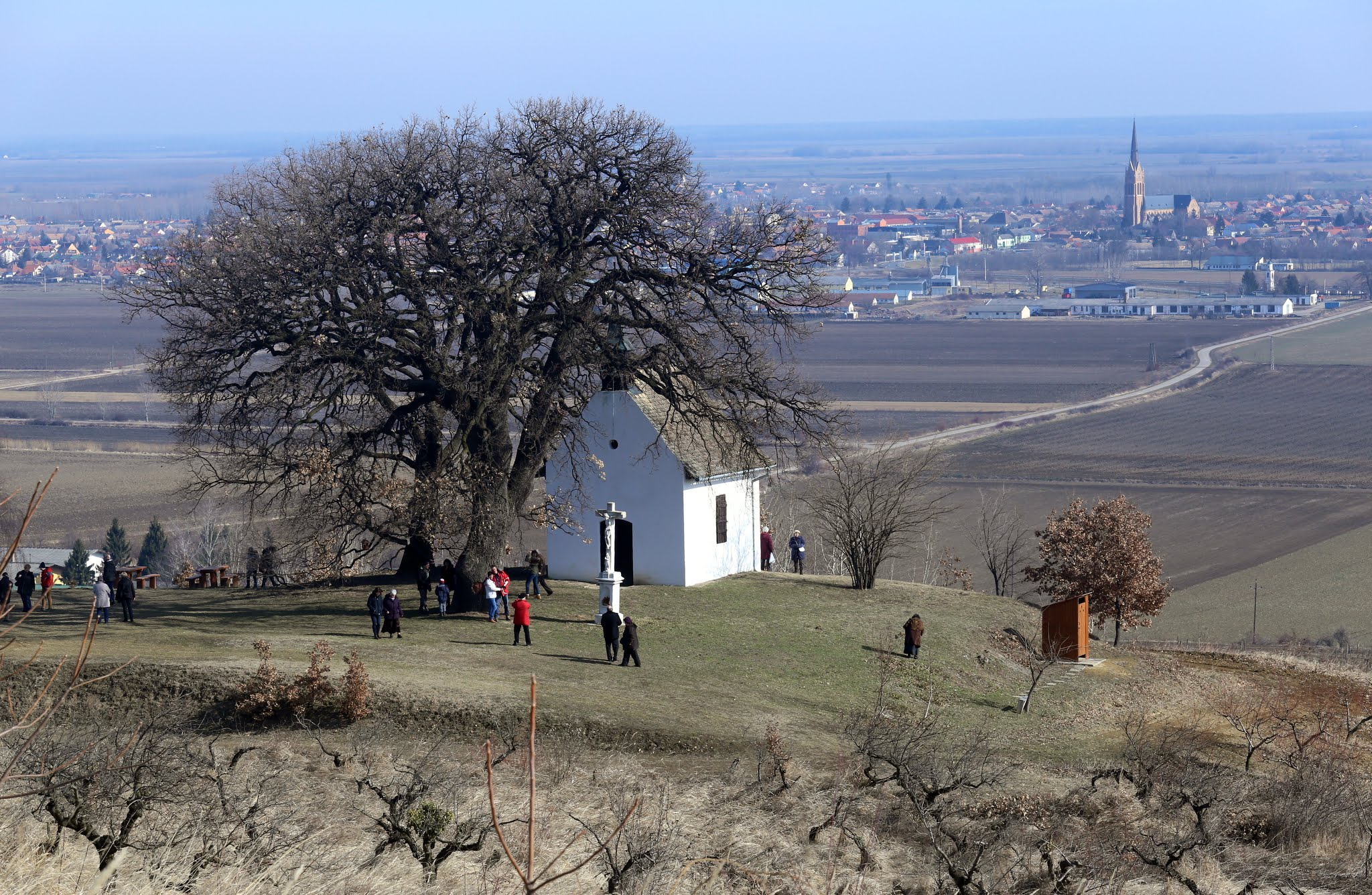 A bátaszéki molyhos tölgy, kora tavaszi napsütésben. Szent Orbán-kápolna